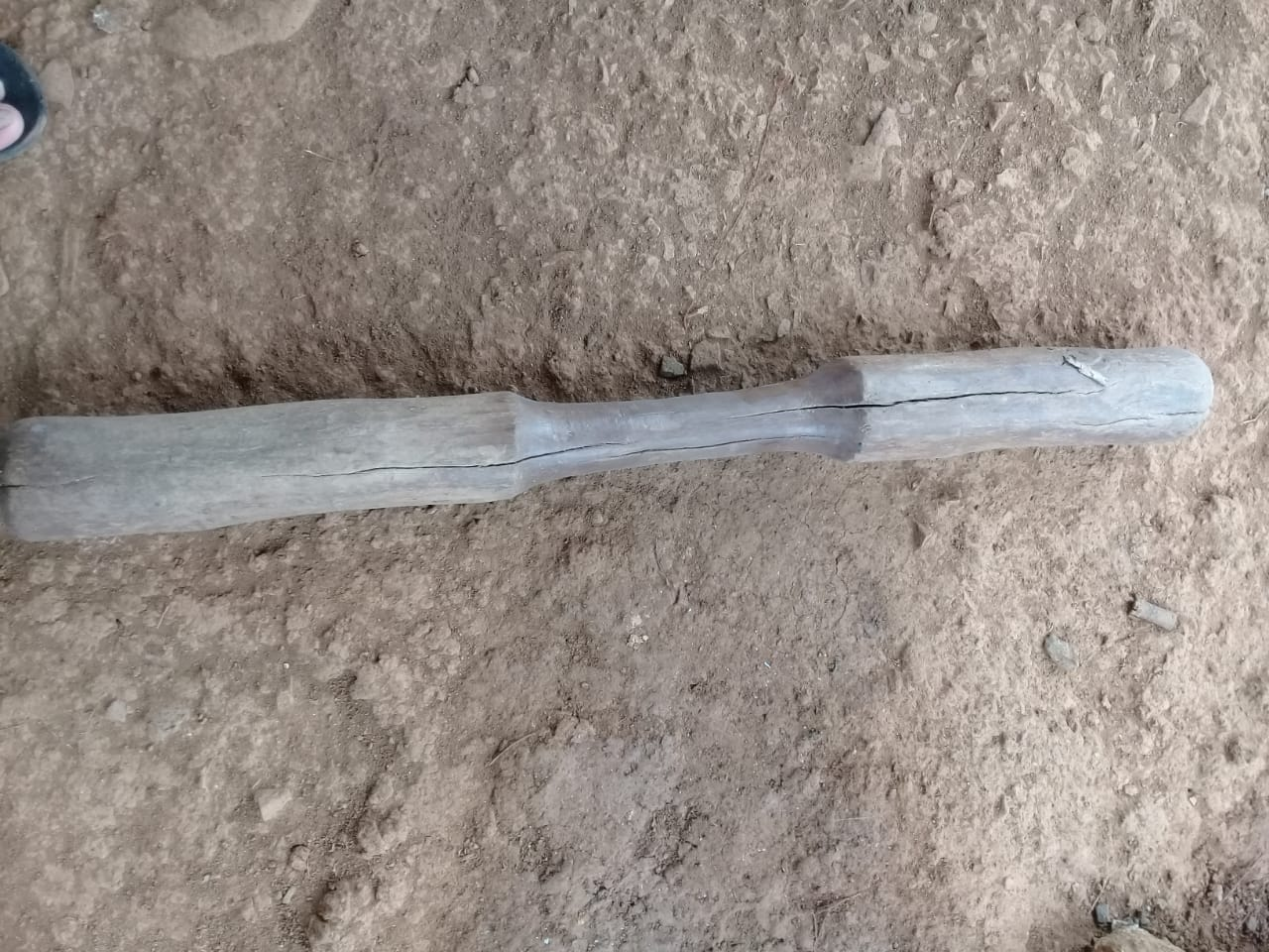 es la herramienta que se usa para pilar